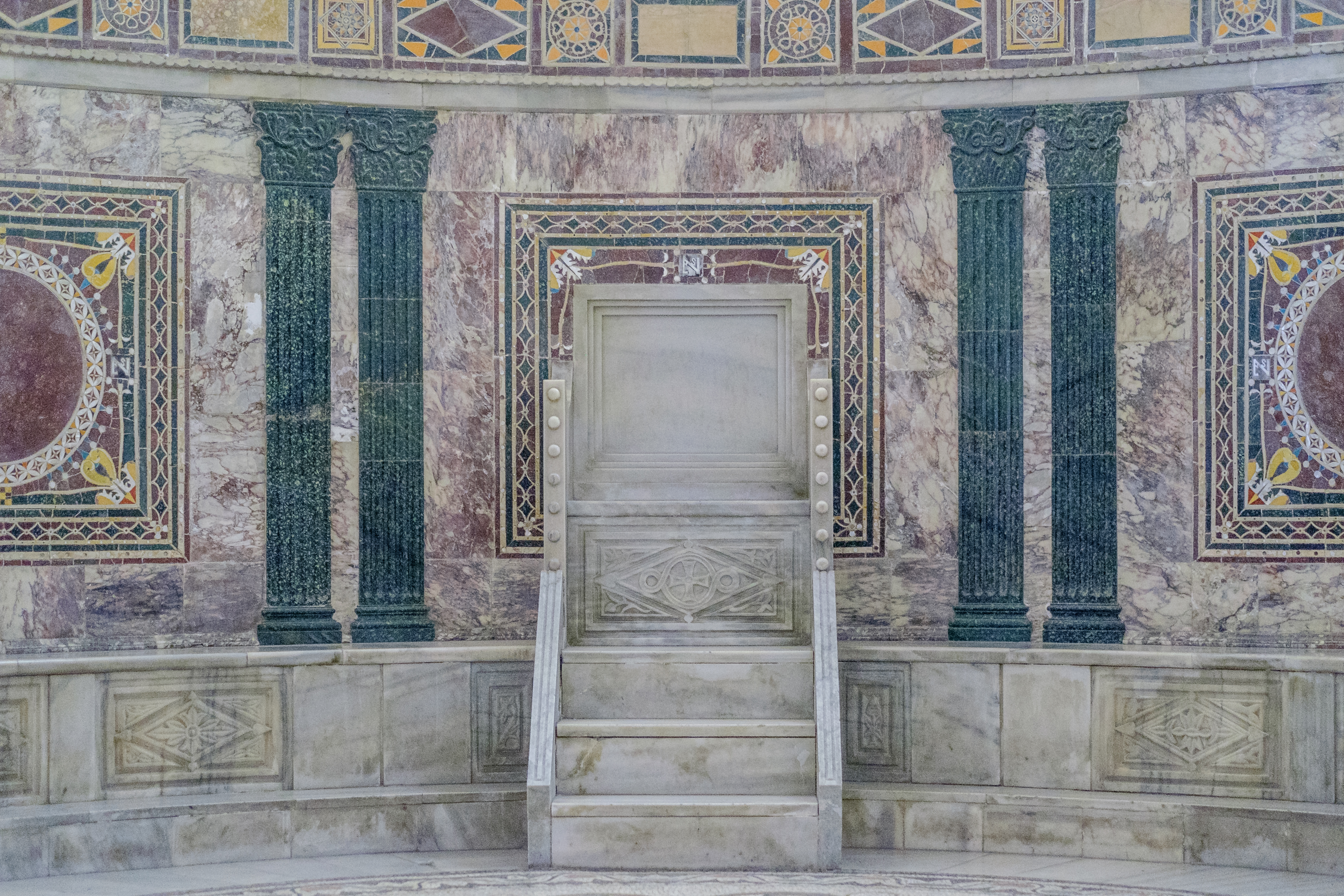 Ravenna